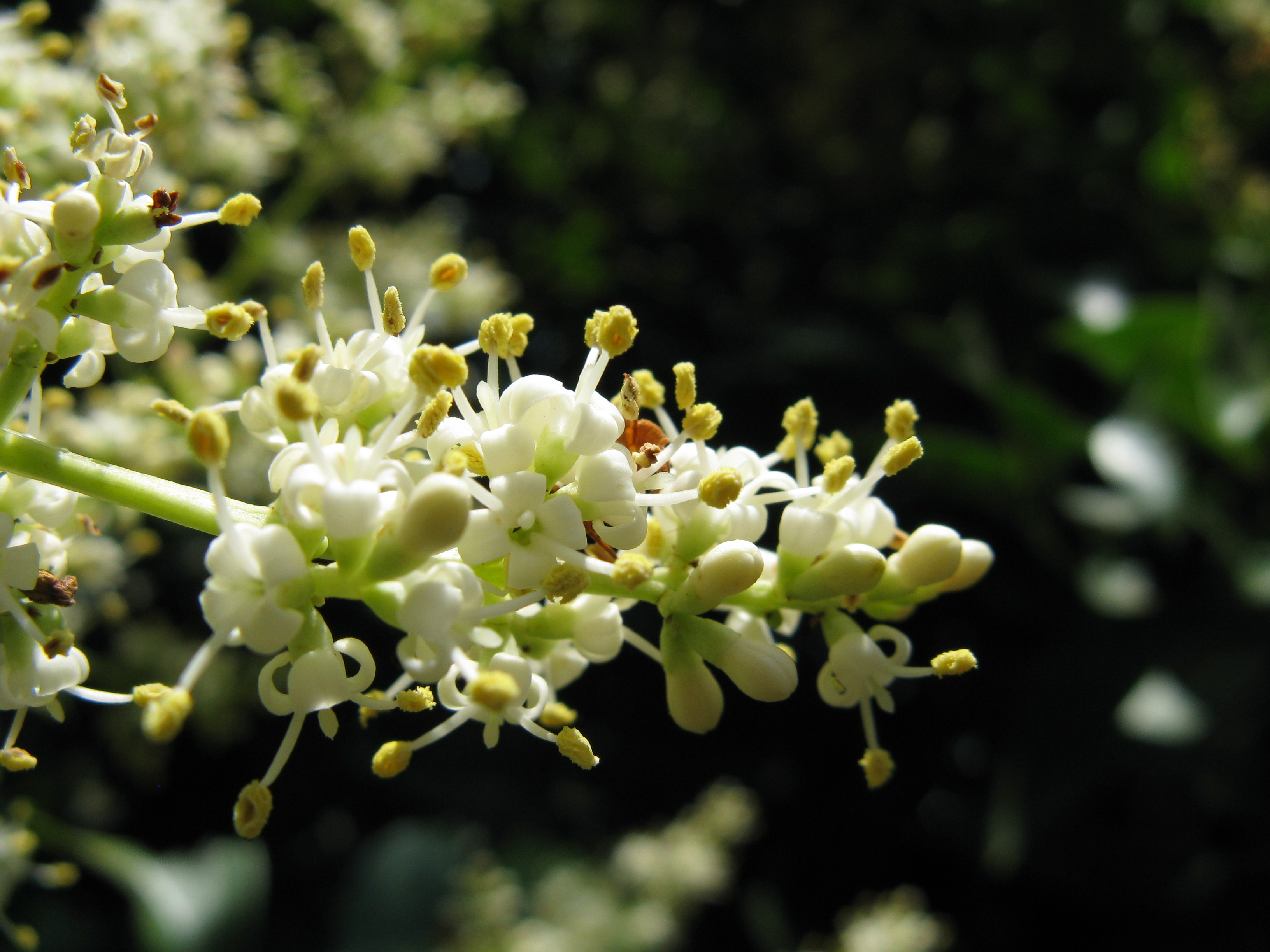 Scientific name Ligustrum lucidum